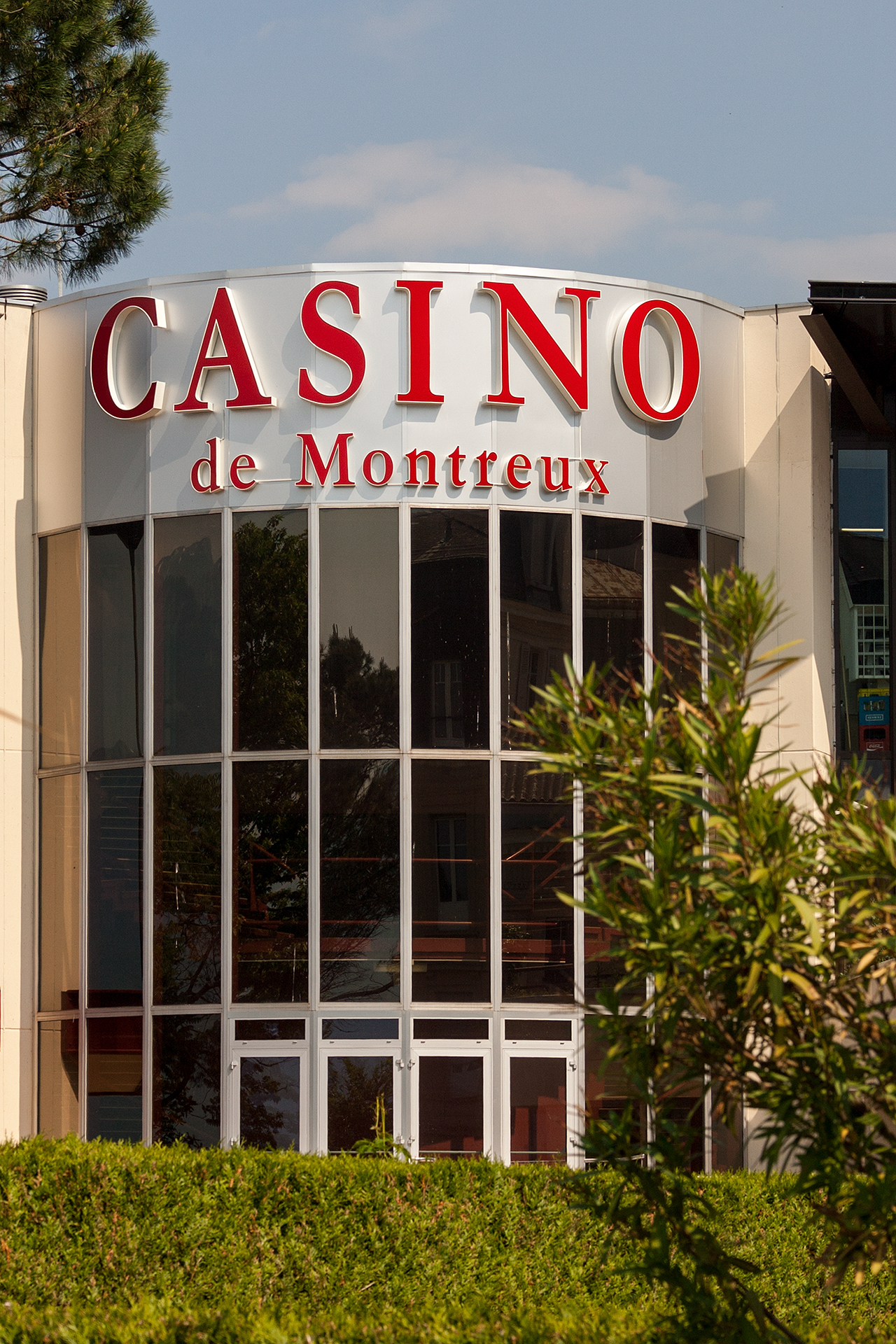 Teilansicht des Casinos in Montreux (VD)